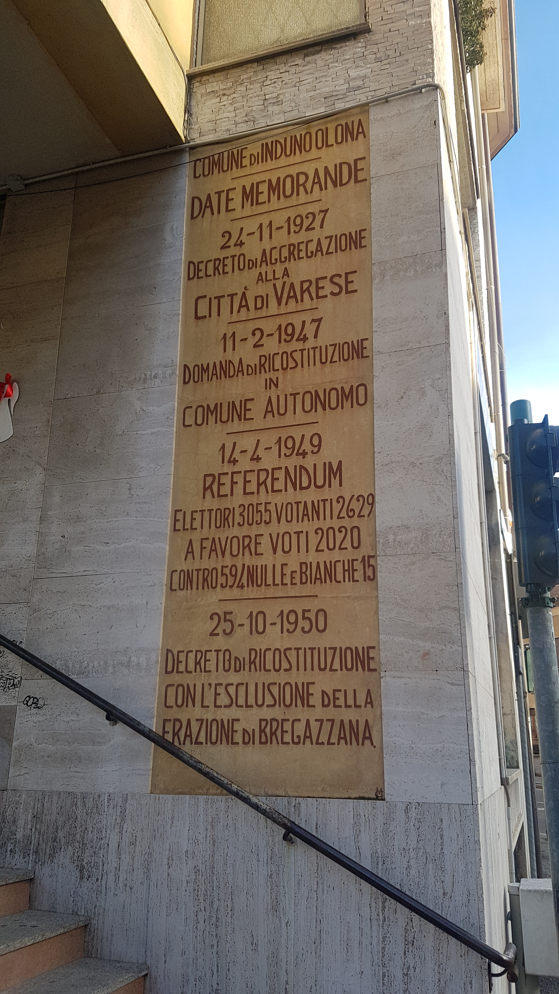 Lapide commemorativa apposta nel 1950 per ricordare il referendum ricostitutivo del Comune autonomo a seguito dell'accorpamento della città di Varese durante il governo Mussolini